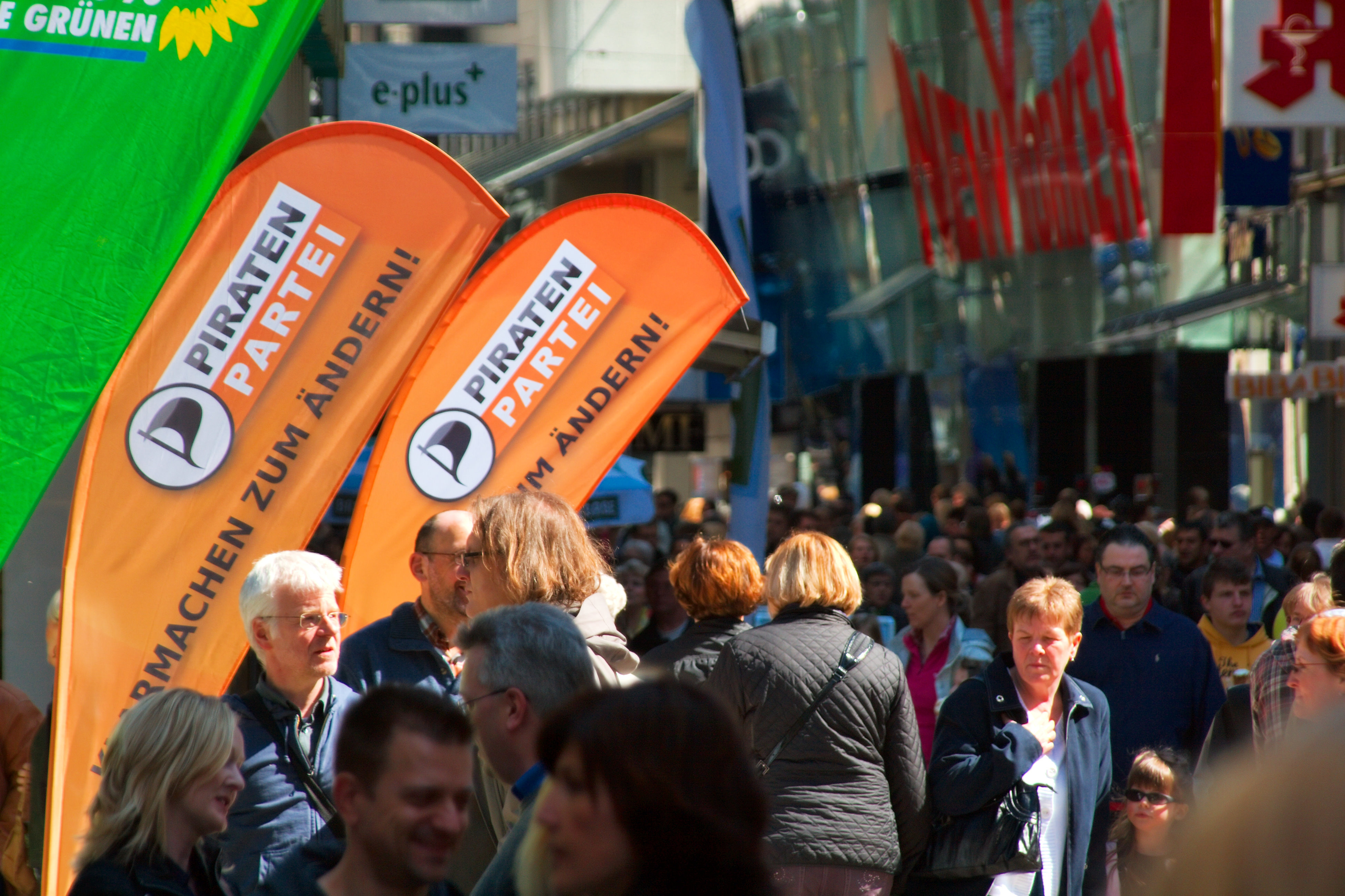 Infostand der Piratenpartei in der Dortmunder Innenstand (Fußgängerzone auf dem Westenhellweg zwischen der Mayerschen und Salamander) am 18. April 2010.